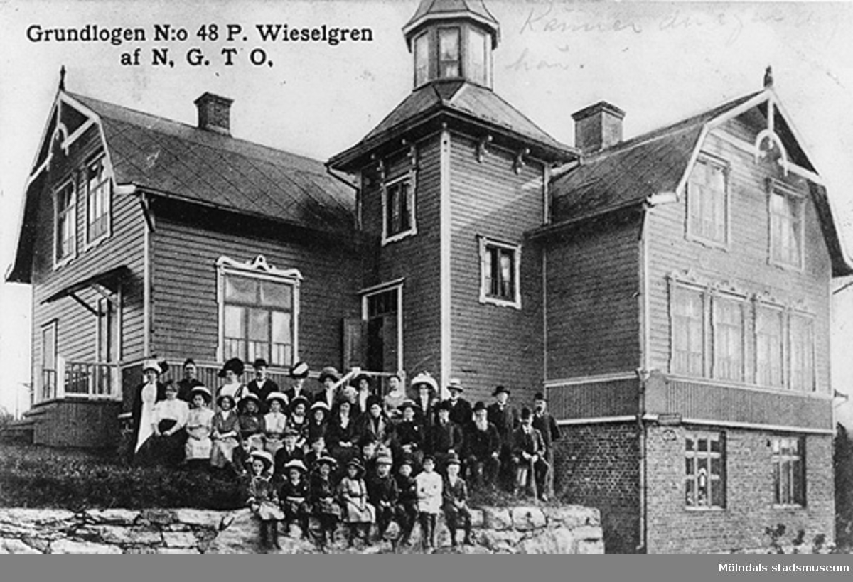 "Grundlogen N:o 48 P. Wieselgren af N.G.T.O." Hemmet" på Ormås, Ormåsgatan 4. Ordenshus för NGTO. Huset brann 1917. Harris Musik finns nu på denna tomt.